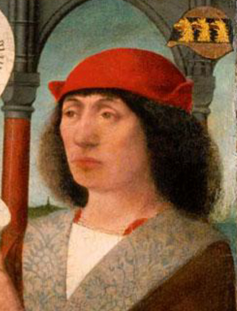 Hinrich Lipperade der Jüngere († 1494), Lübecker Ratsherr. Ausschnitt aus einem Devotionalbild, ursprünglich wohl im Michaeliskonvent.